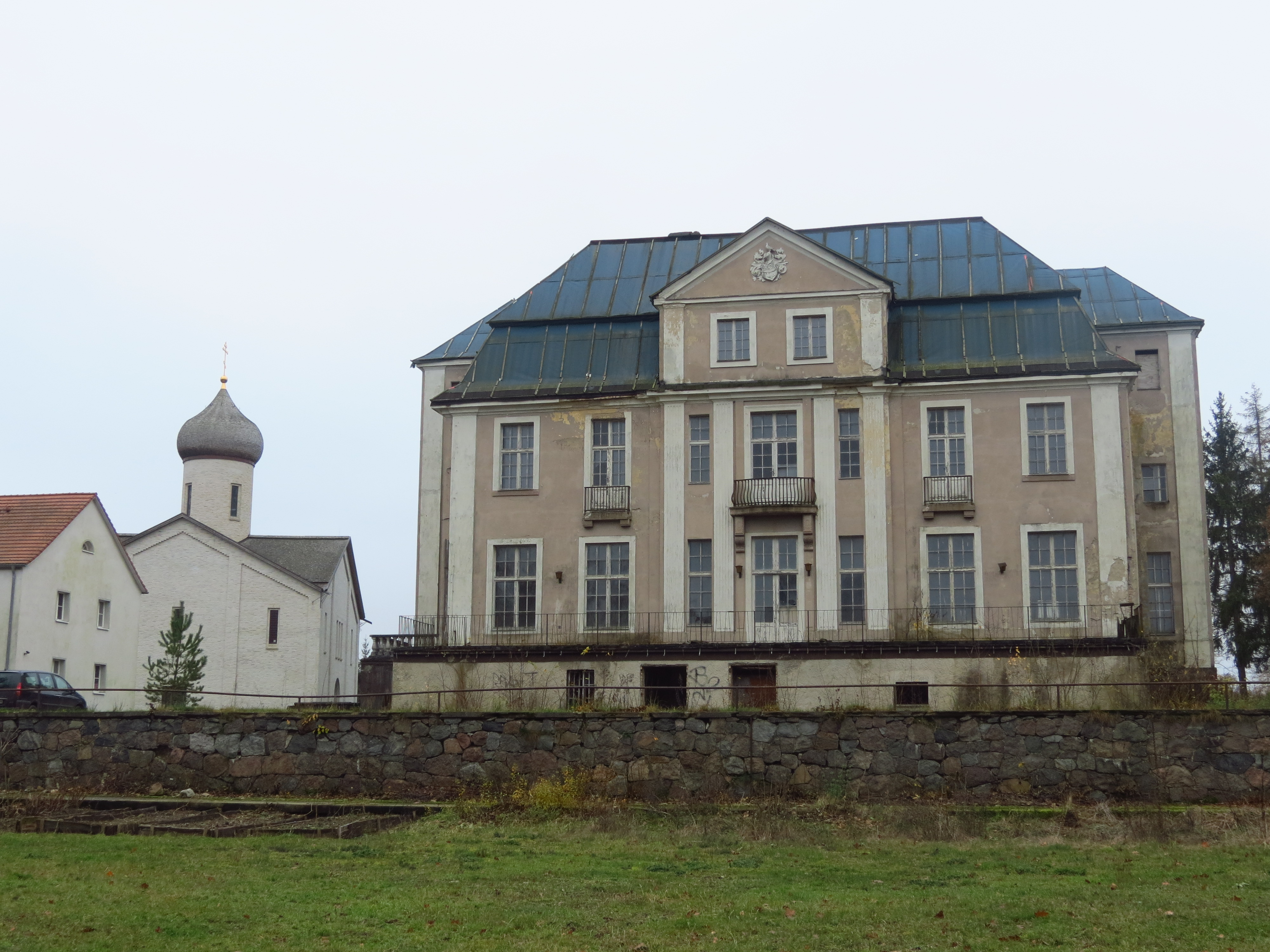 Gutshaus Götschendorf, Gästehaus des Klosters Götschendorf, Parkseite, Gemeinde Milmersdorf, Lkr. Uckermark, Brandenburg